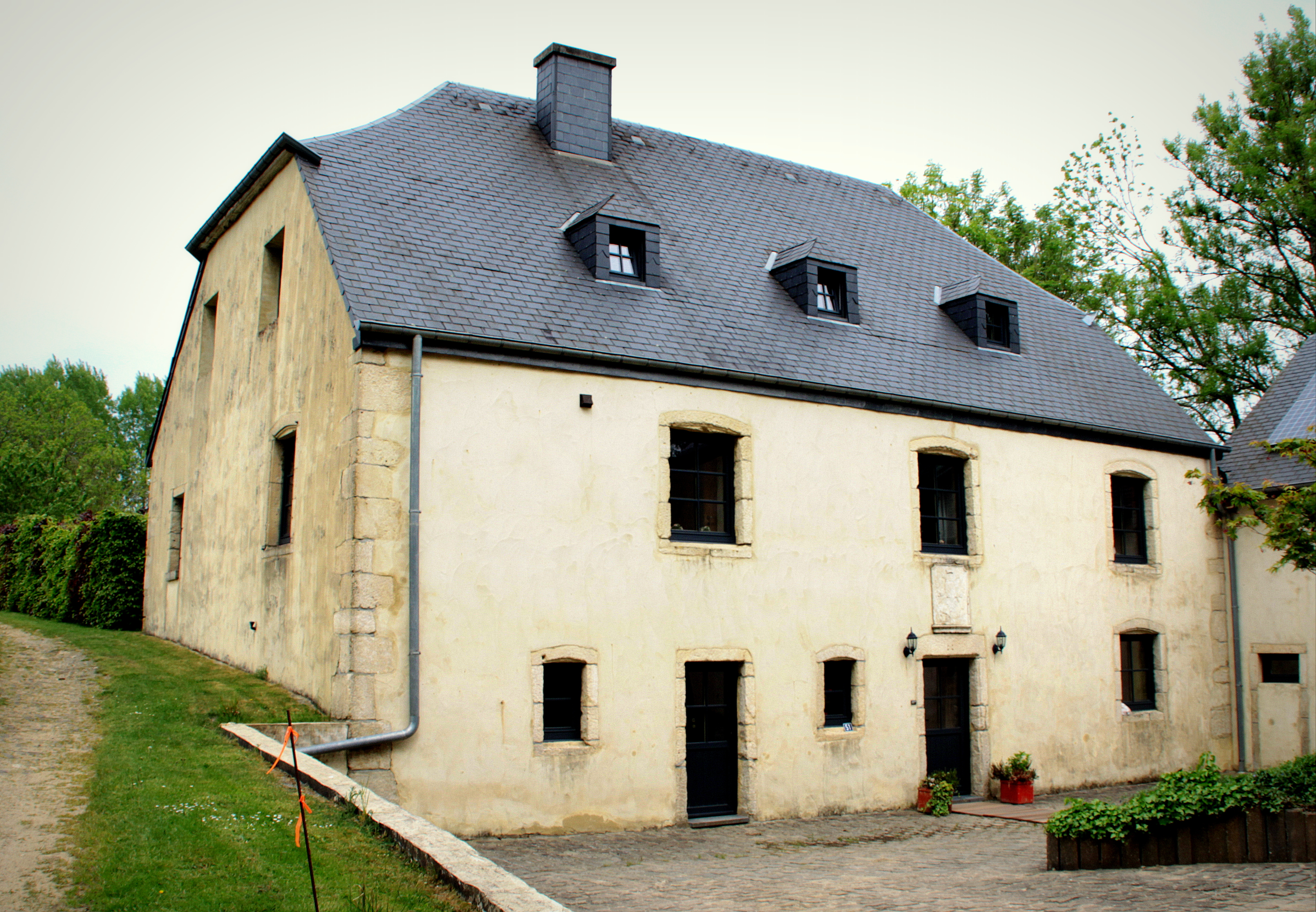 D'Lampachmillen (2015)